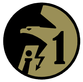 WZÓR GRAFICZNY OZNAKI ROZPOZNAWCZEJ 1. REJONU WSPARCIA TELEINFORMATYCZNEGO SIŁ POWIETRZNYCH NA MUNDUR POLOWY